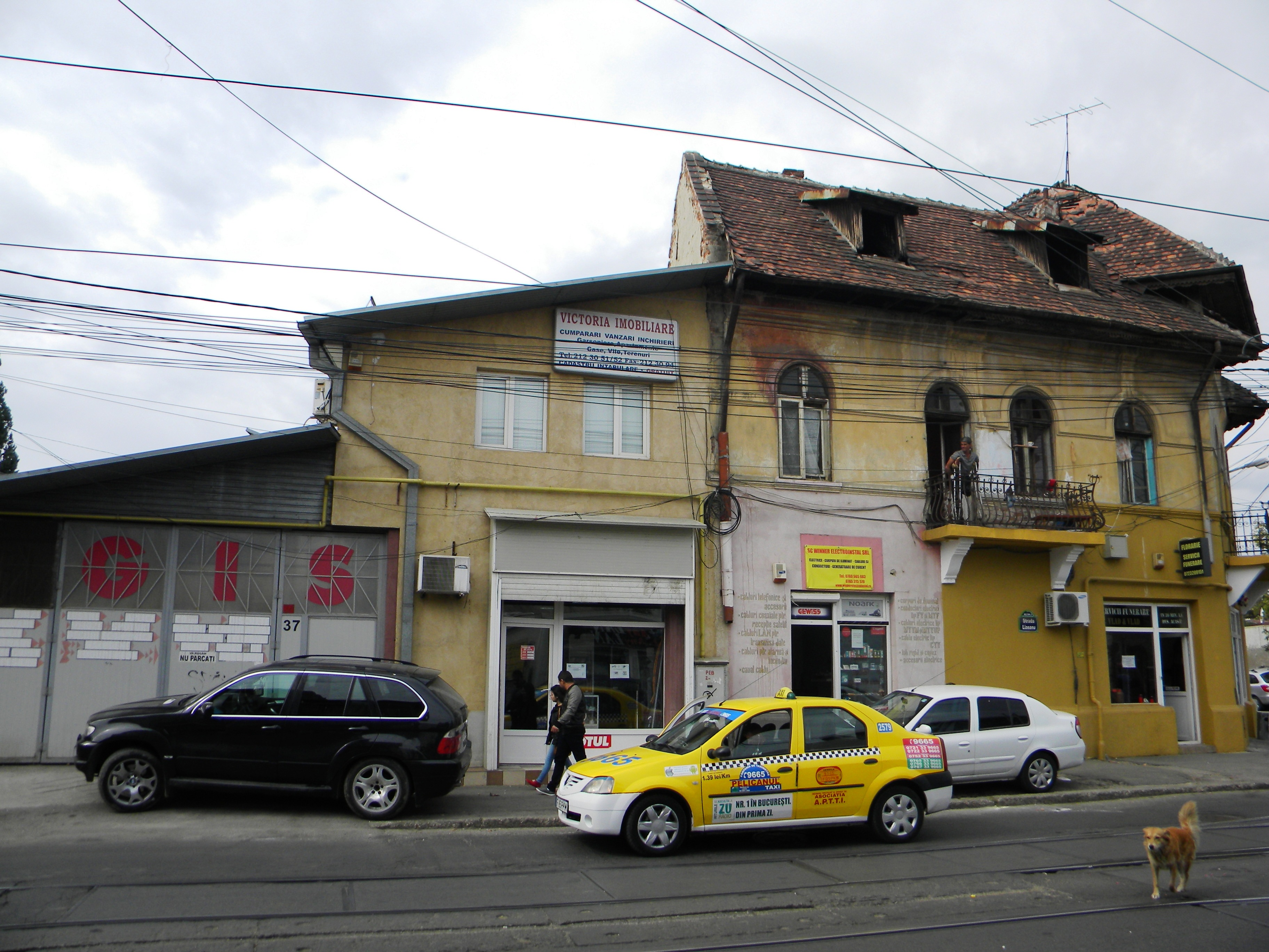 Bucuresti, Romania, Casa pe Str. Lizeanu nr. 37, sect. 2